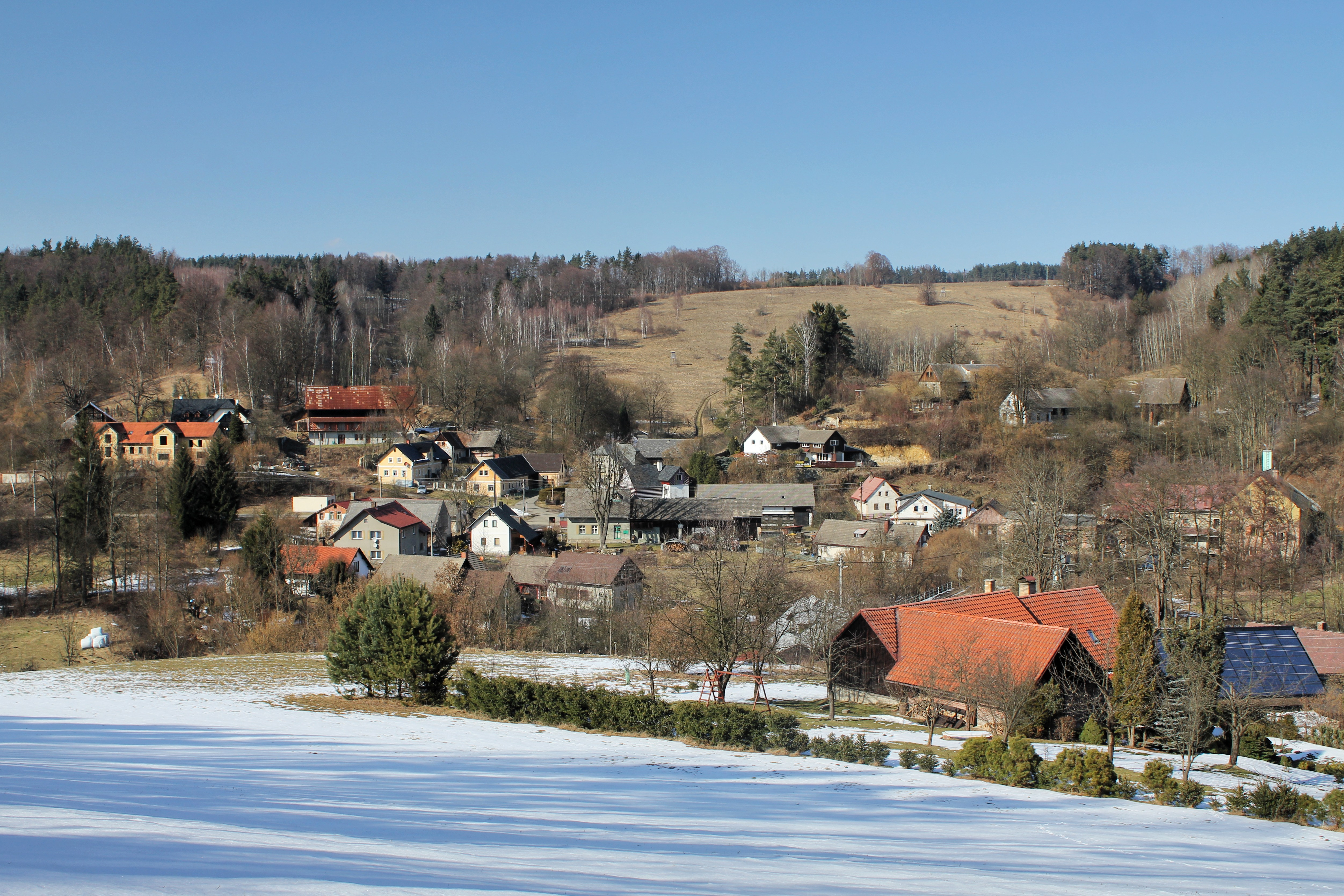 Pohled na Třtí